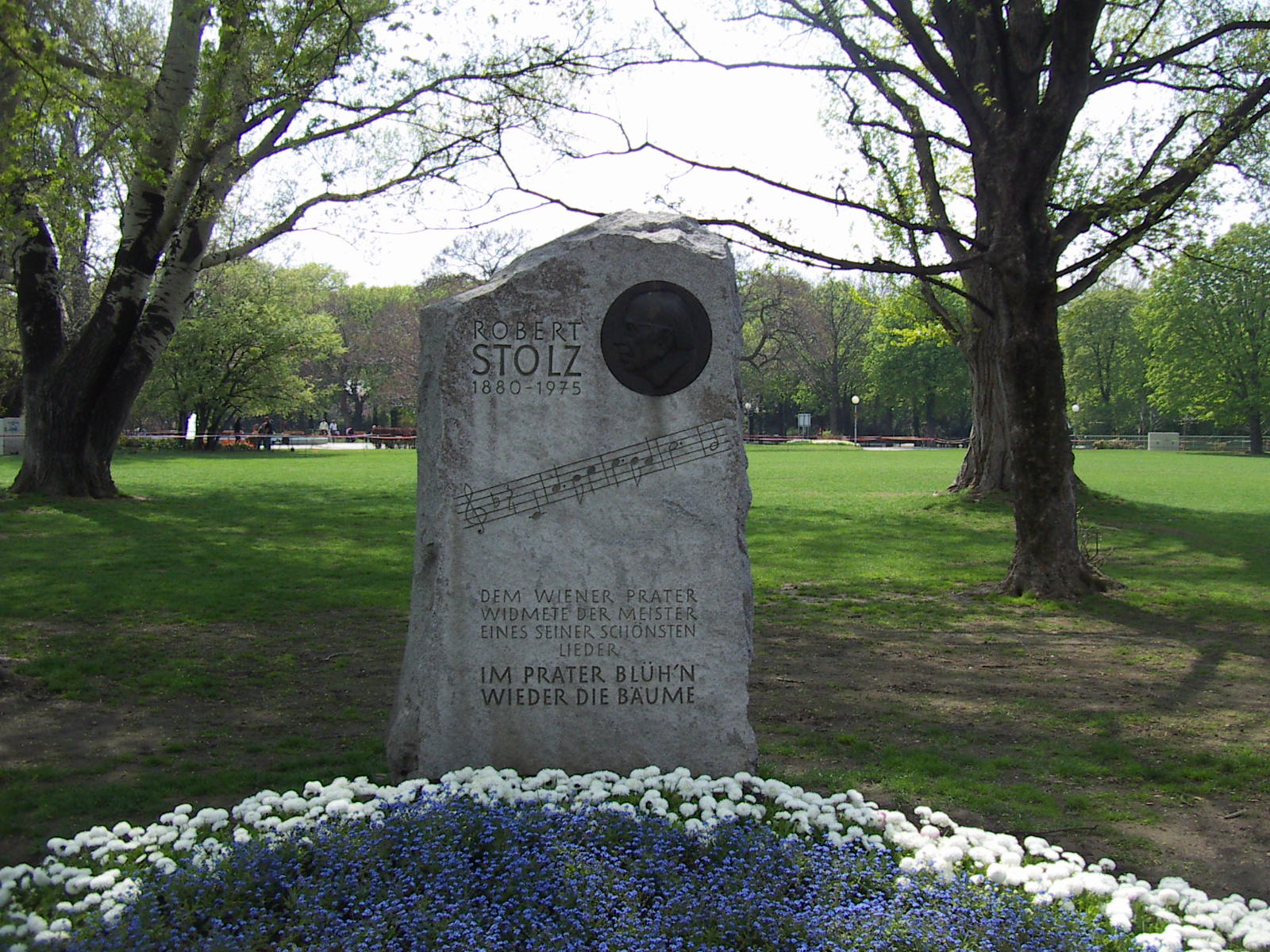 Robert Stolz Memorial at the Wiener Prater / Robert Stolz Denkmal im Wiener Prater